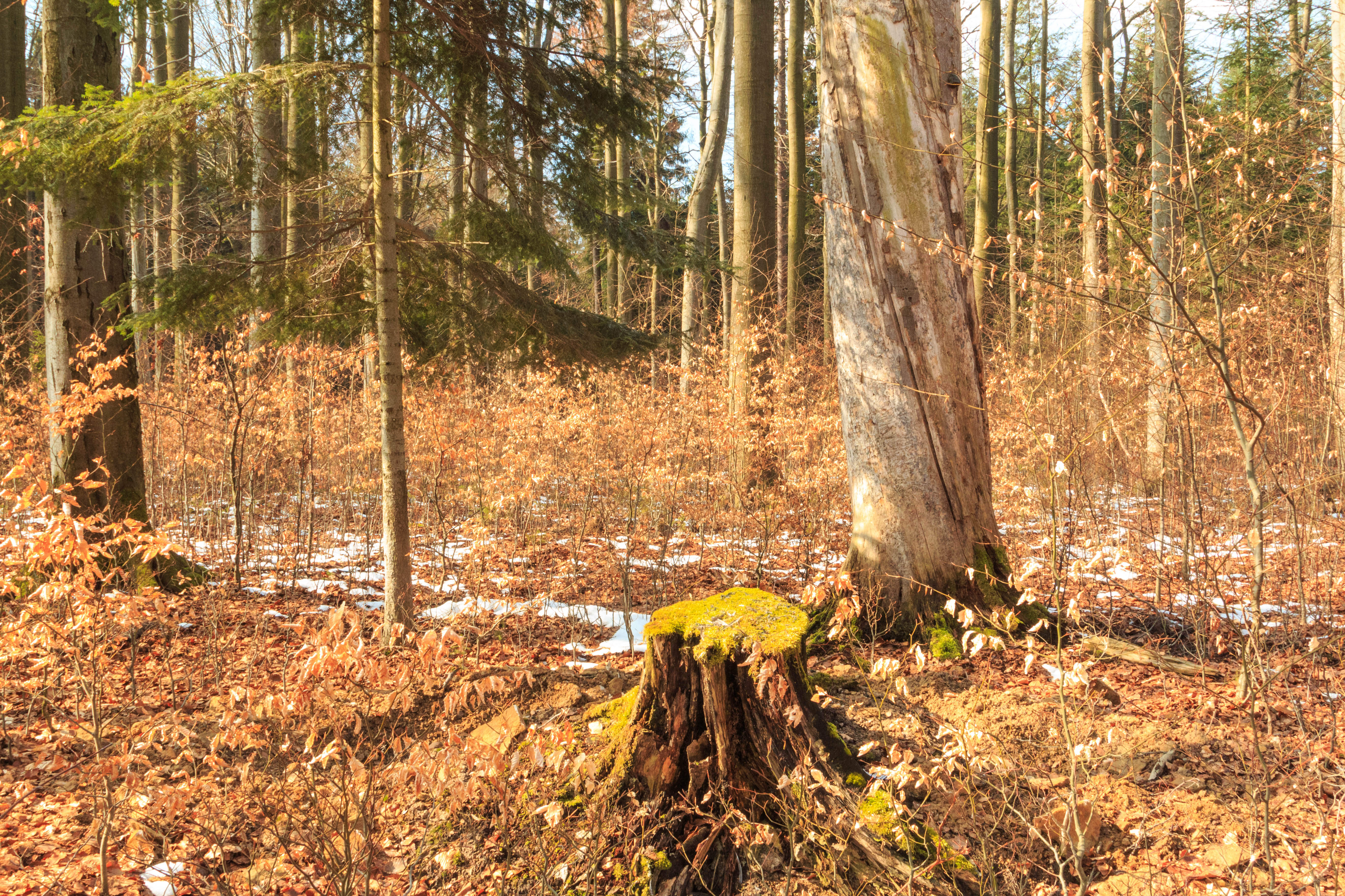 přírodní památka V bukách v březnu 2016 Project: Chráněná území.